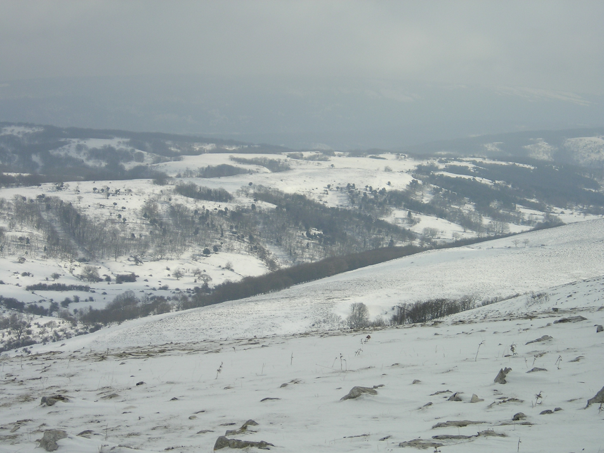 L'immagine è un mio scatto. La condivido in pubblico dominio. --Luigi-CC (msg) 08:23, 29 apr 2008 (CEST)